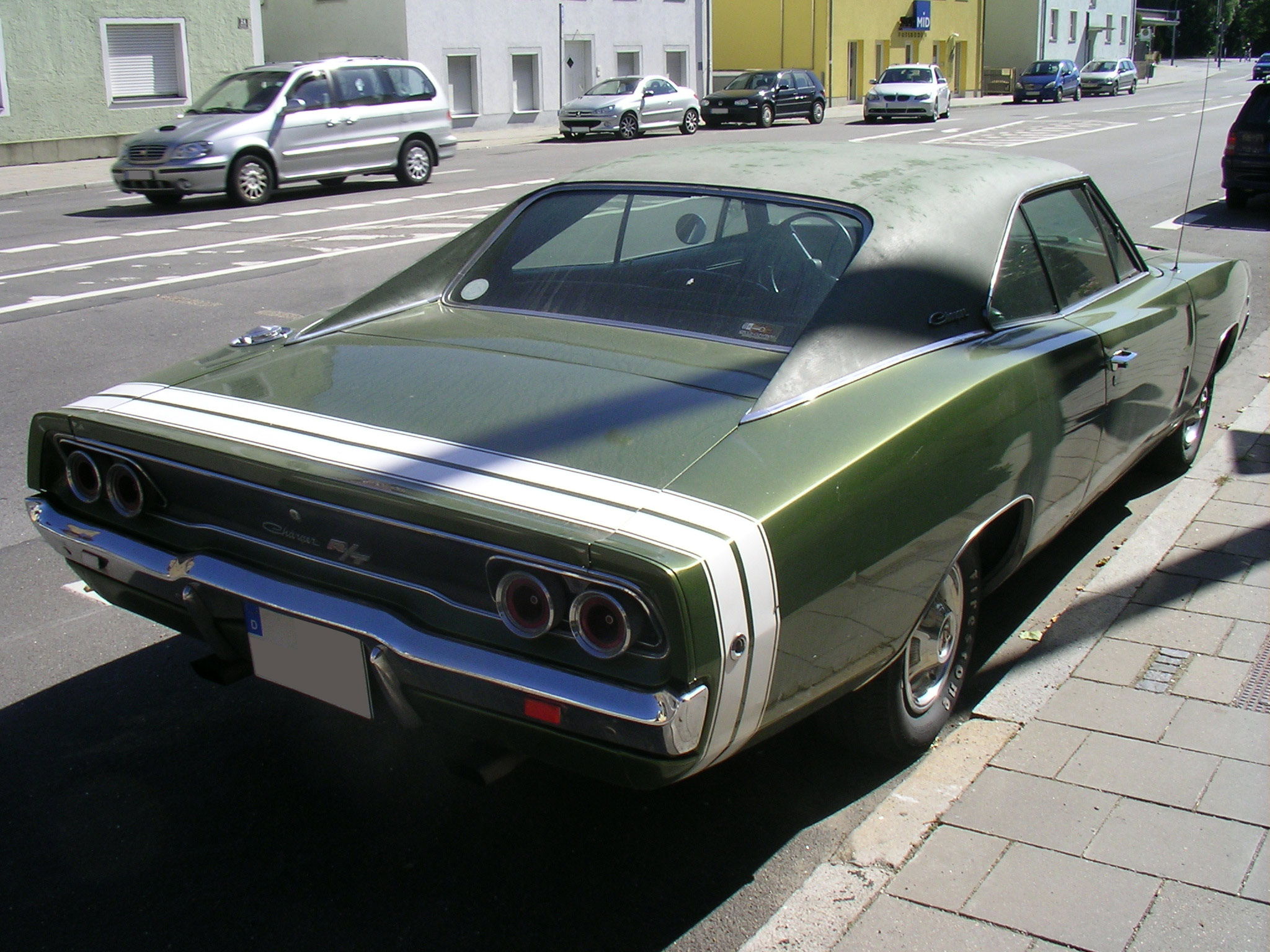 Dodge Charger R/T 1968 Heck